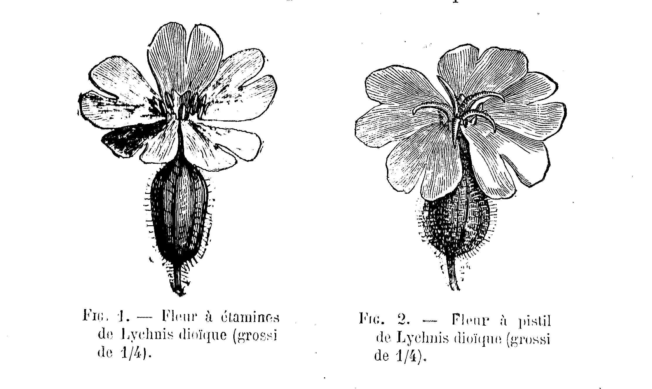 Lychnis - fleurs mâle & femelle